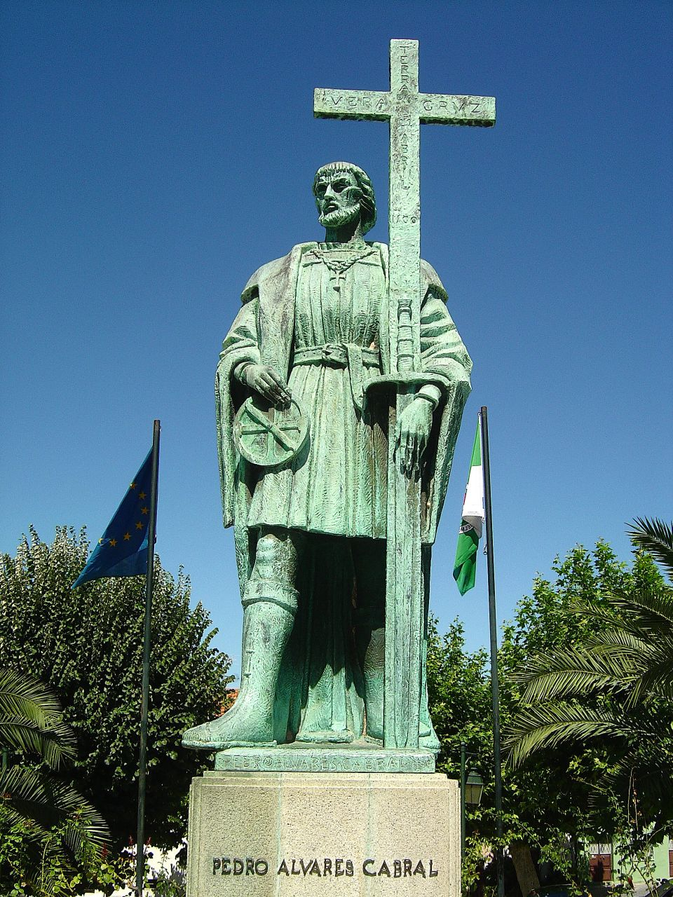 Ser terra de Pedro Álvares Cabral. É o que faz Belmonte mais consciente e orgulhosa do seu valor, história e cultura. O povo reclama-o e toma-o como seu. Convém notar que, para o povo de Belmonte, Cabrais são Cabrais e Pedro Álvares Cabral é algo a parte, é “ o Pedro”. Assim lhe chama o povo, como se fosse seu, e é. Como também o são a imagem da Senhora da Esperança que o acompanhou na descoberta do Brasil e o Castelo onde nasceu. É claro que, com a descoberta do Brasil por Pedro Álvares Cabral, Belmonte sente também como sua a glória - que até políticos e reis demoraram a perceber - de terem feito a maior descoberta de Portugal: o Brasil. Esta é a terra de gente tão heróica e esforçada como os grandes heróis que aqui nasceram e daqui partiram. É uma história que está no sangue da gente. É uma história que ainda se pode ler nas ruas, na gente, nas lendas, e mesmo nas crónicas e na própria história, apesar de, por norma, esta só se referir a grandes factos e seus protagonistas. E a estátua que Pedro Álvares Cabral tem em Belmonte, curiosamente, não está virada para o mar, nem para o belo vale do rio Zêzere. Está voltada para a parte da vila que na quase totalidade já existia no tempo em que ele nasceu. 64.233.183.104/search?q=cache:vBAw2MkrqXAJ: See where this picture was taken. [?]